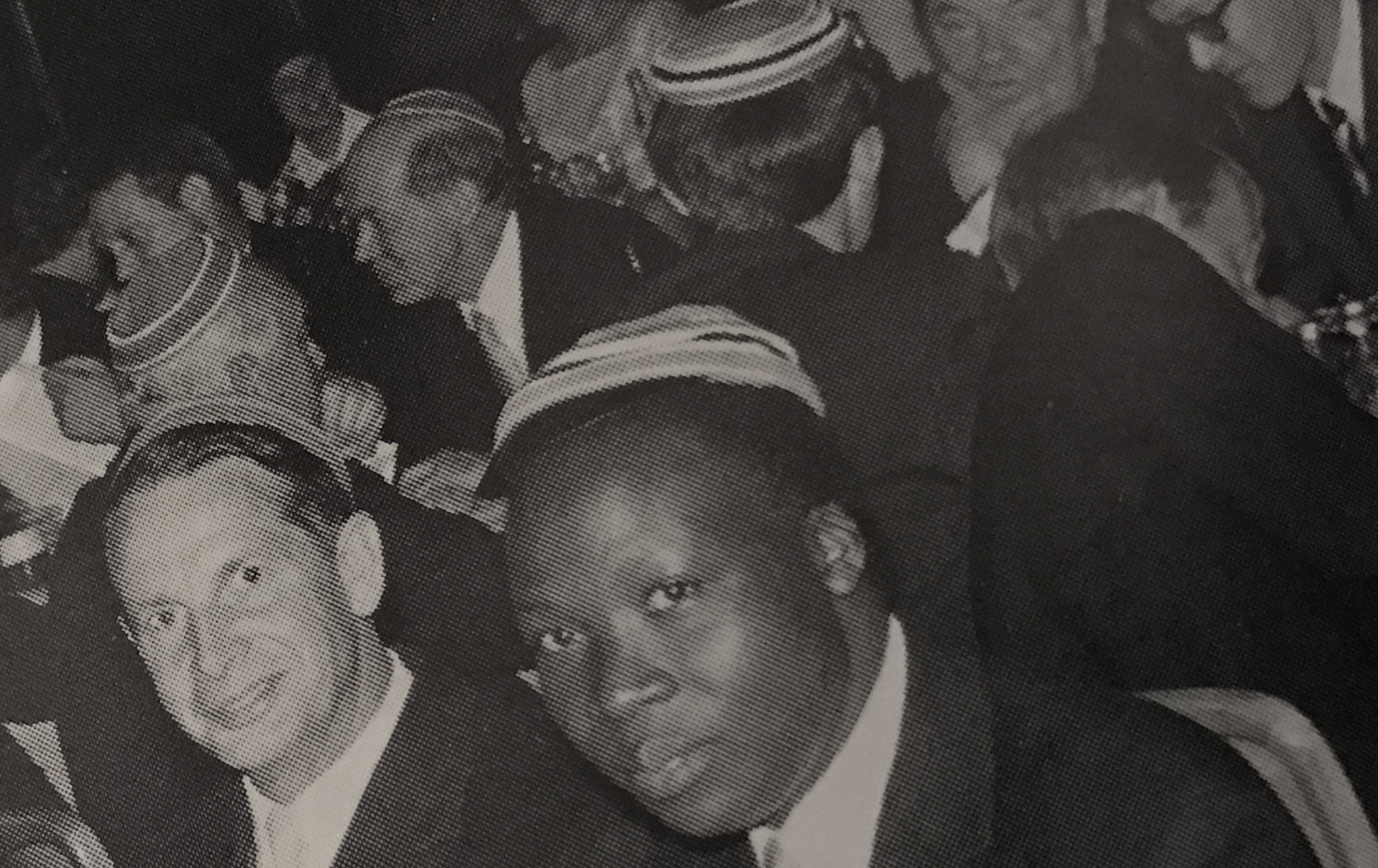 Alois Mubiru im Kreise der Glanzenburger